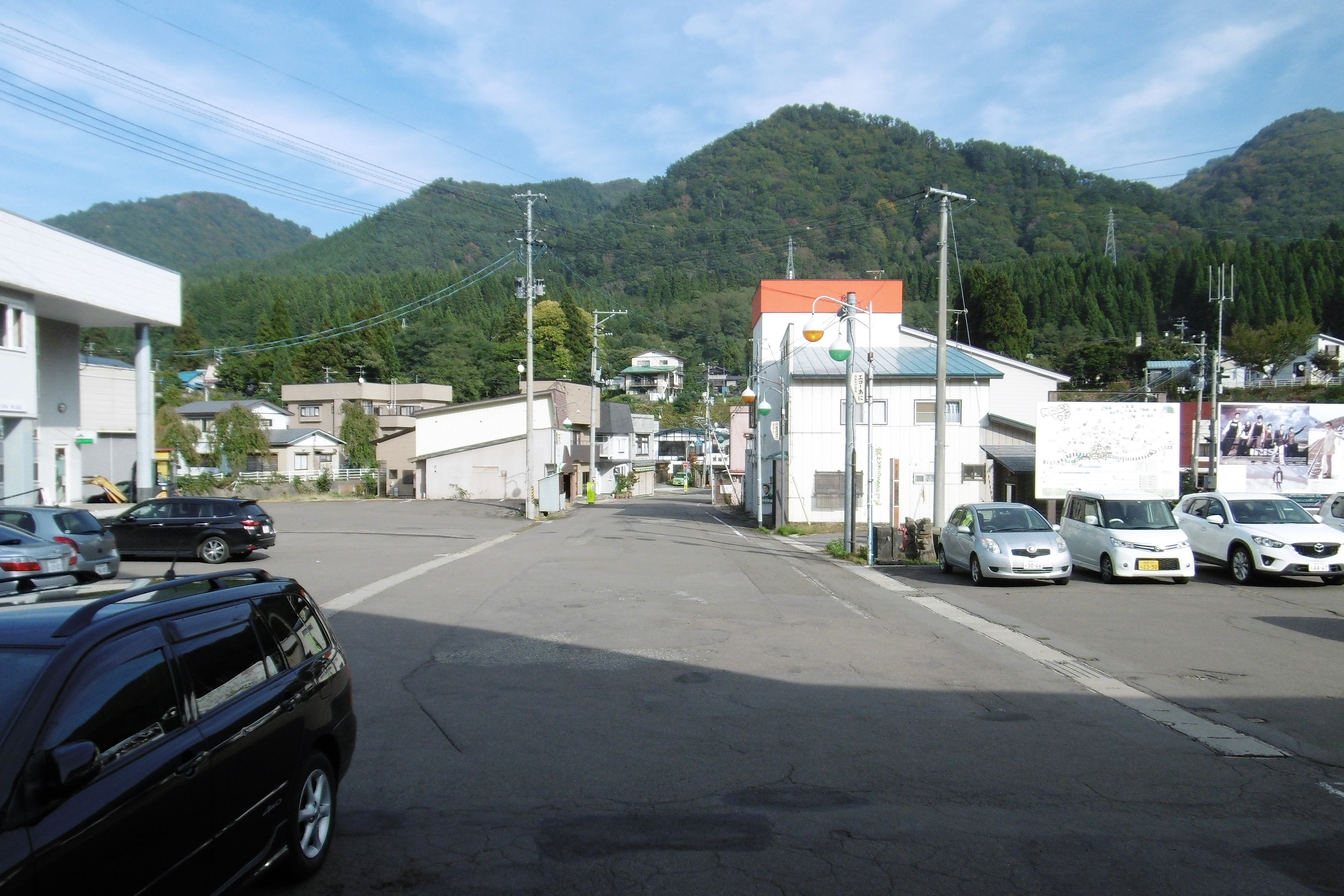 阿仁合駅前：秋田県北秋田市阿仁銀山